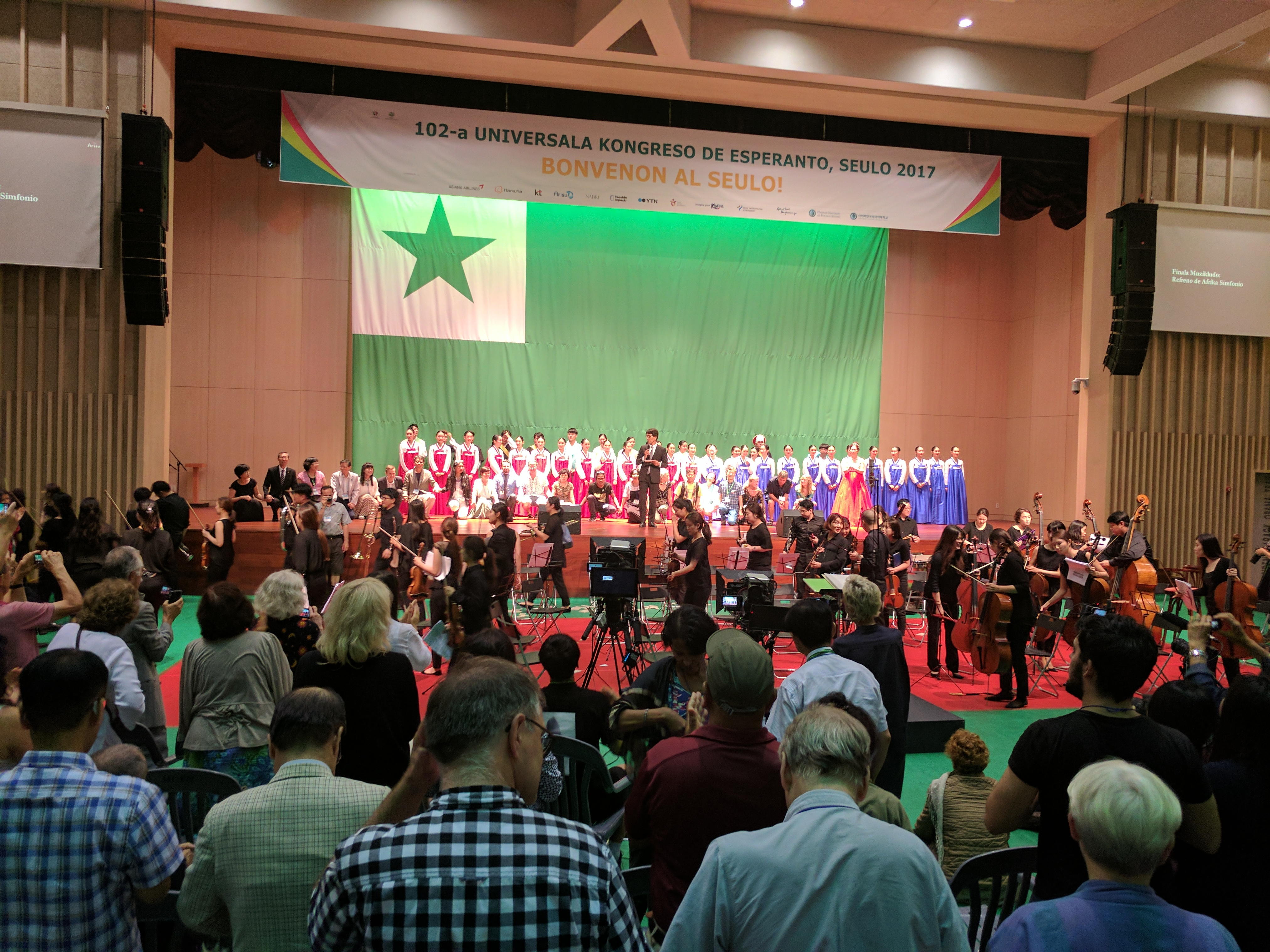 Nacia Vespero